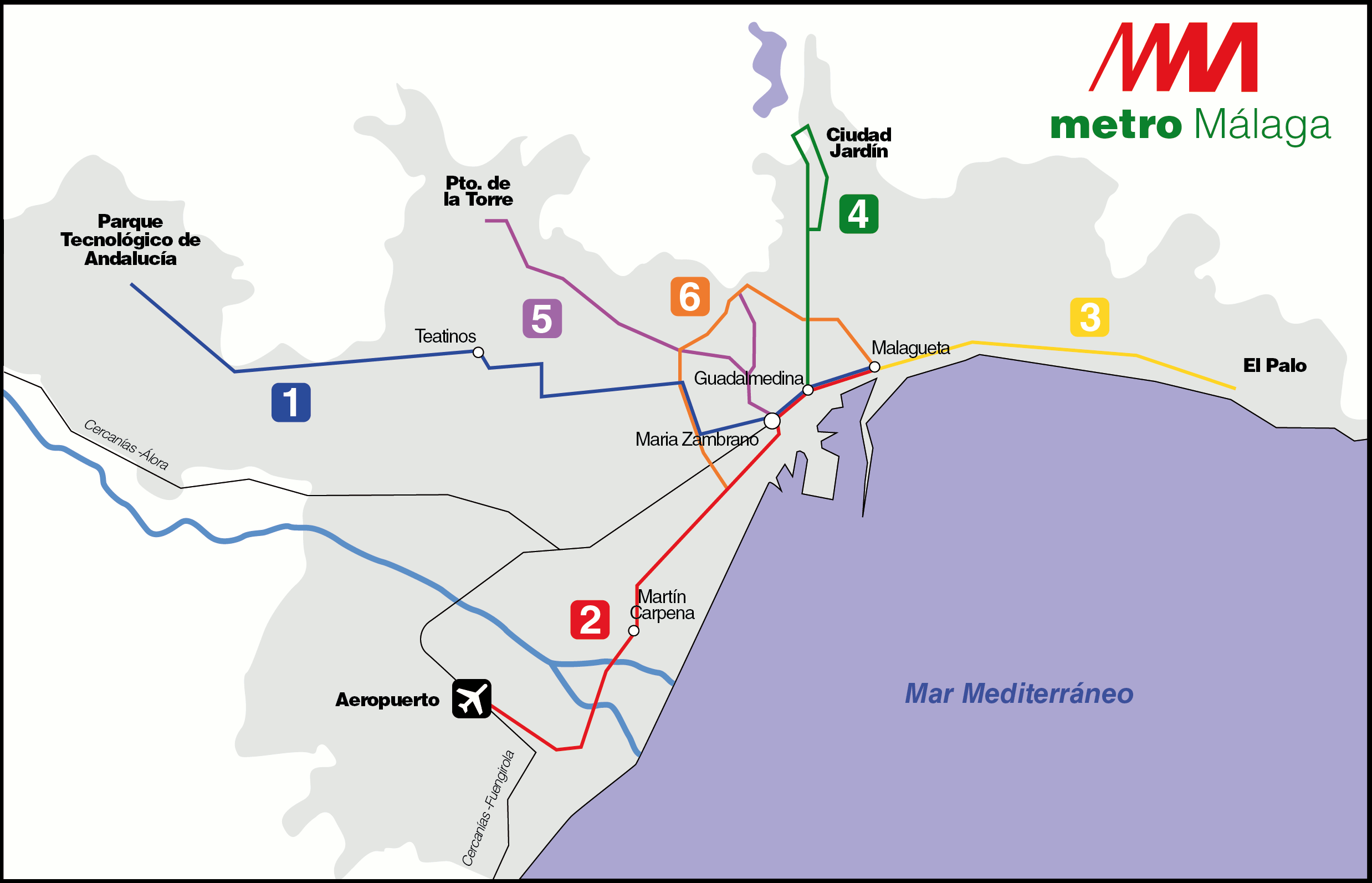 Mapa de las futuras líneas del metro de Málaga en Alta Calidad